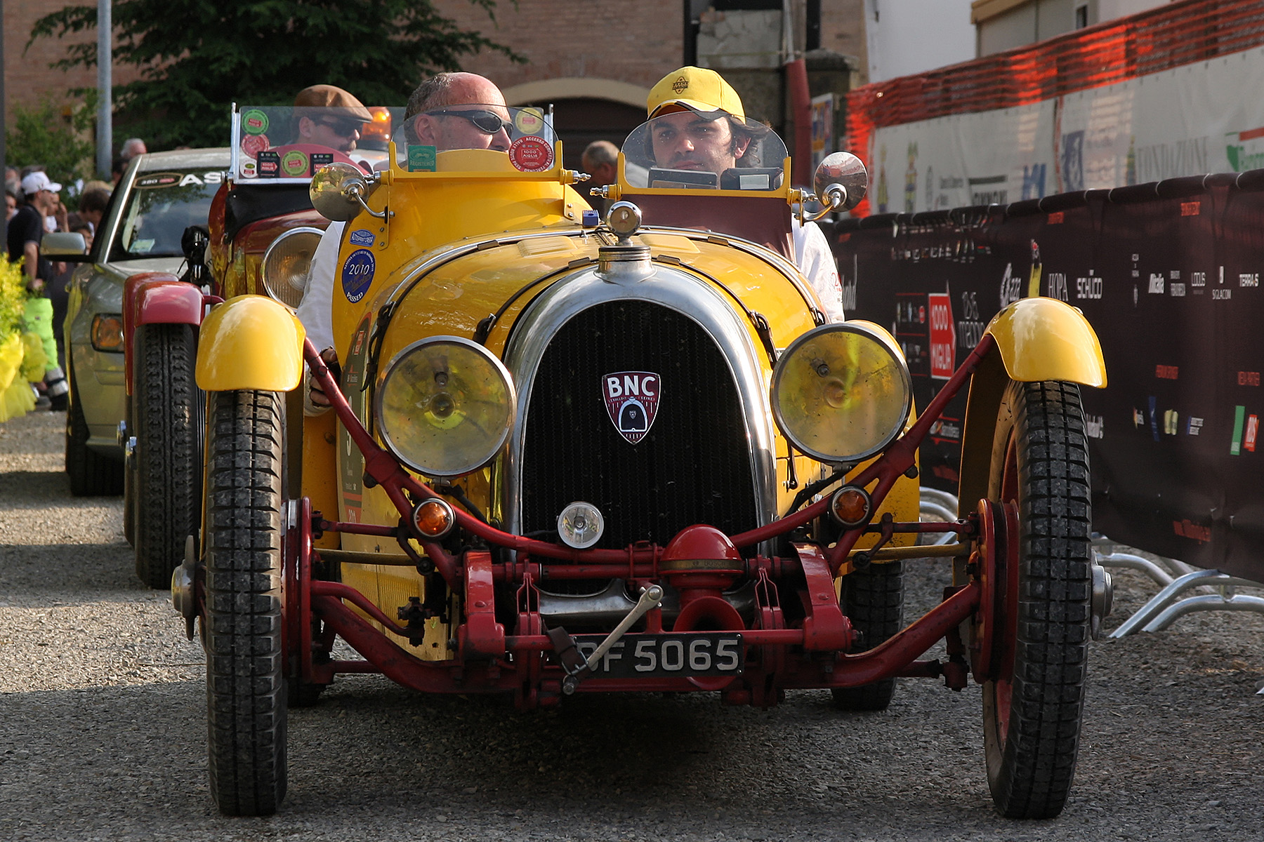 Mille Miglia 2011